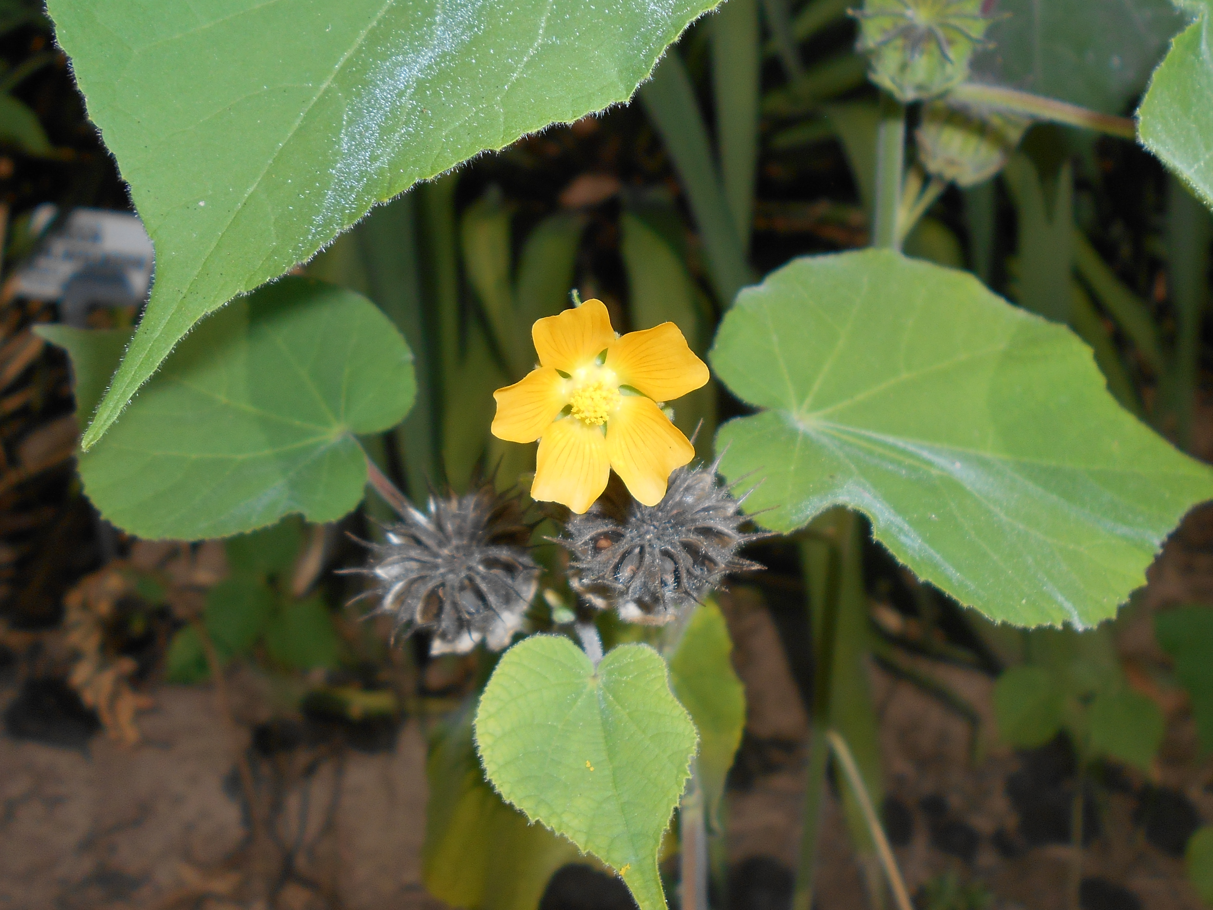 Zaślaz pospolity (Abutilon theophrasti), Ogród Botaniczny UMCS w Lublinie